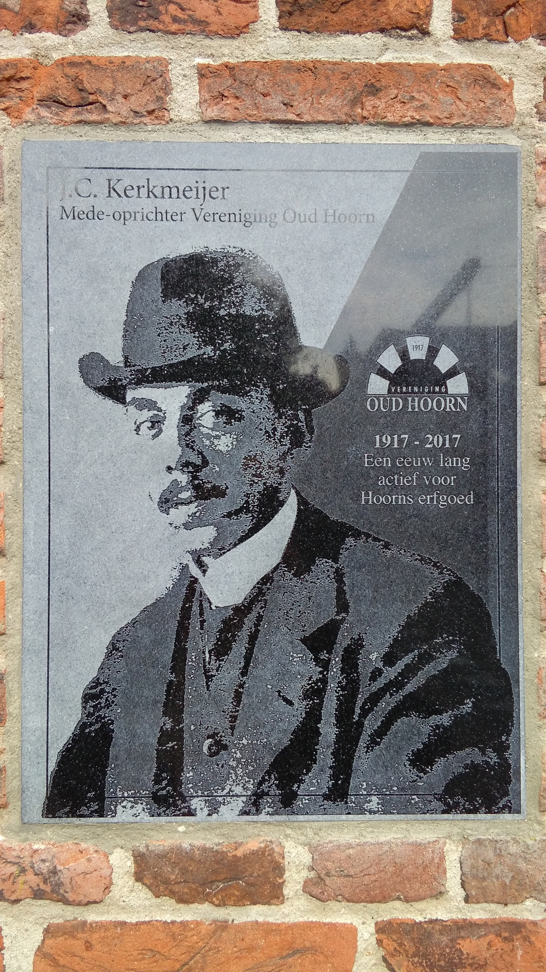 Plaquette ter herinnering aan J.C. Kerkmeijer op de gevel van het VOC-pakhuis aan de Onder de Boompjes in Hoorn. In het pakhuis houdt Vereniging Oud Hoorn kantoor en Kermeijer was een van de oprichters van de vereniging.